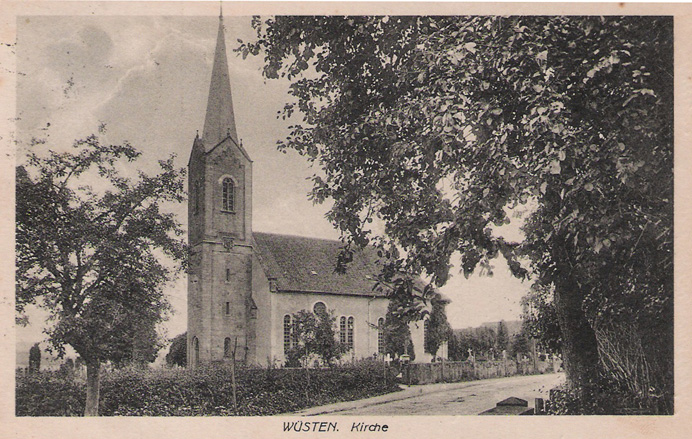 Deutschland - Nordrhein-Westfalen - Kreis Lippe - Bad Salzuflen - Wüsten: Ev.-ref. Kirche